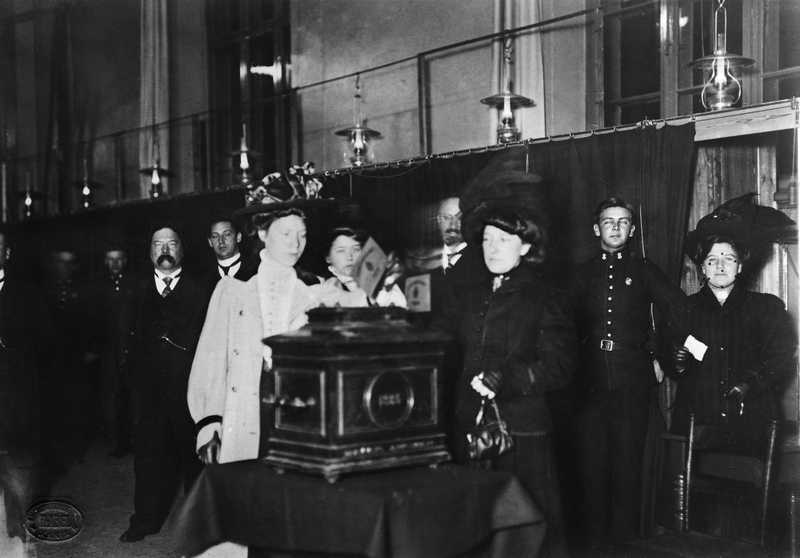 Første kvinne legger stemmeseddelen i urnen ved valget i 1910. Akershus festning, Gymnastikkbygget, interiør, kommunevalg stemmegivning, valgurne, kvinnestemmerett. Fra Oslo Museum. .